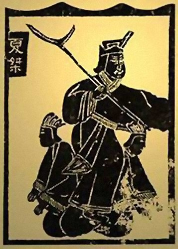 夏桀像